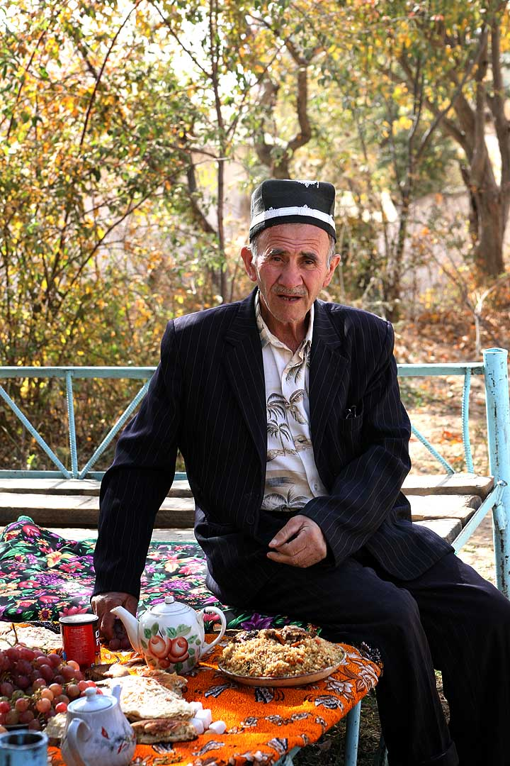 Мужчина во время трапезы. На снимке Традиционные блюда, чай, лепёшки, плов, фруктыТоҷикӣ: Мард ҳангоми хӯрокхурӣ. Дар дастархон - чой, палав, нон, мева